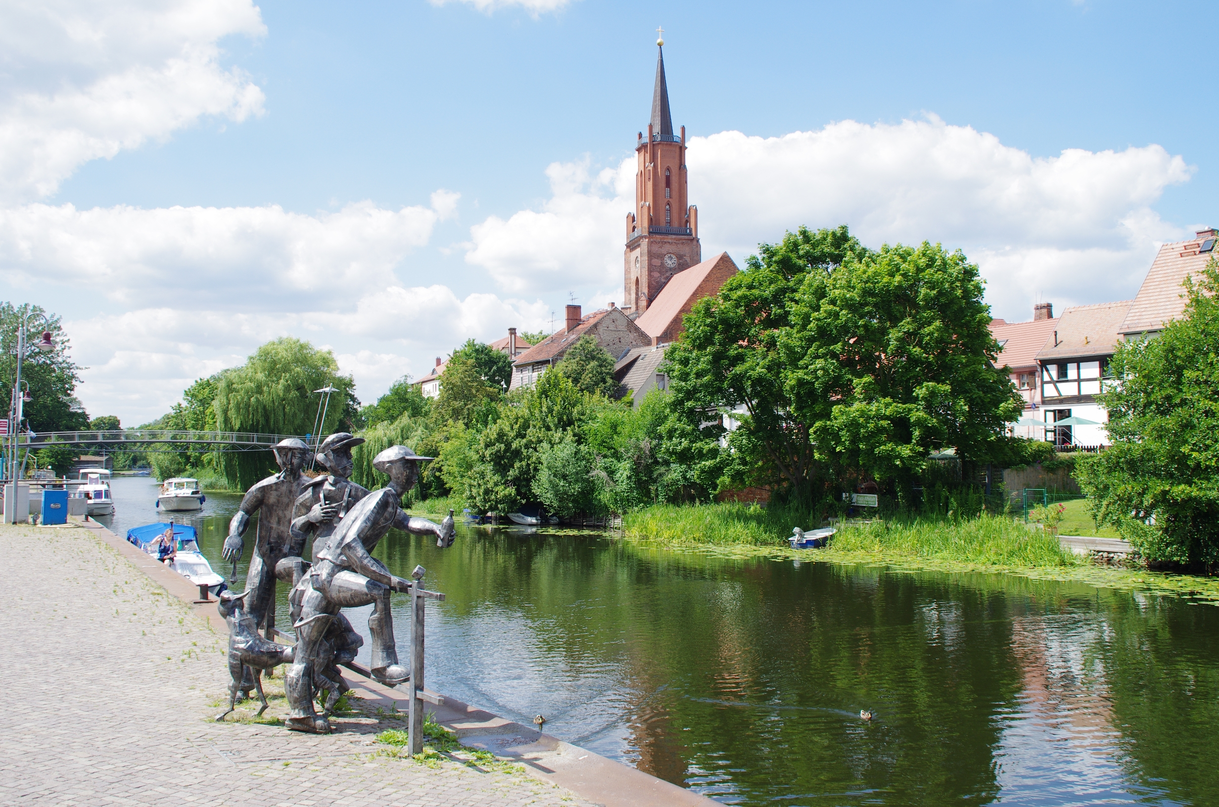 Rathenow in Brandenburg. Der Kirchberg und die Schleuse in Rathenow. Links befindet sich das Denkmal die Schleusenspucker.